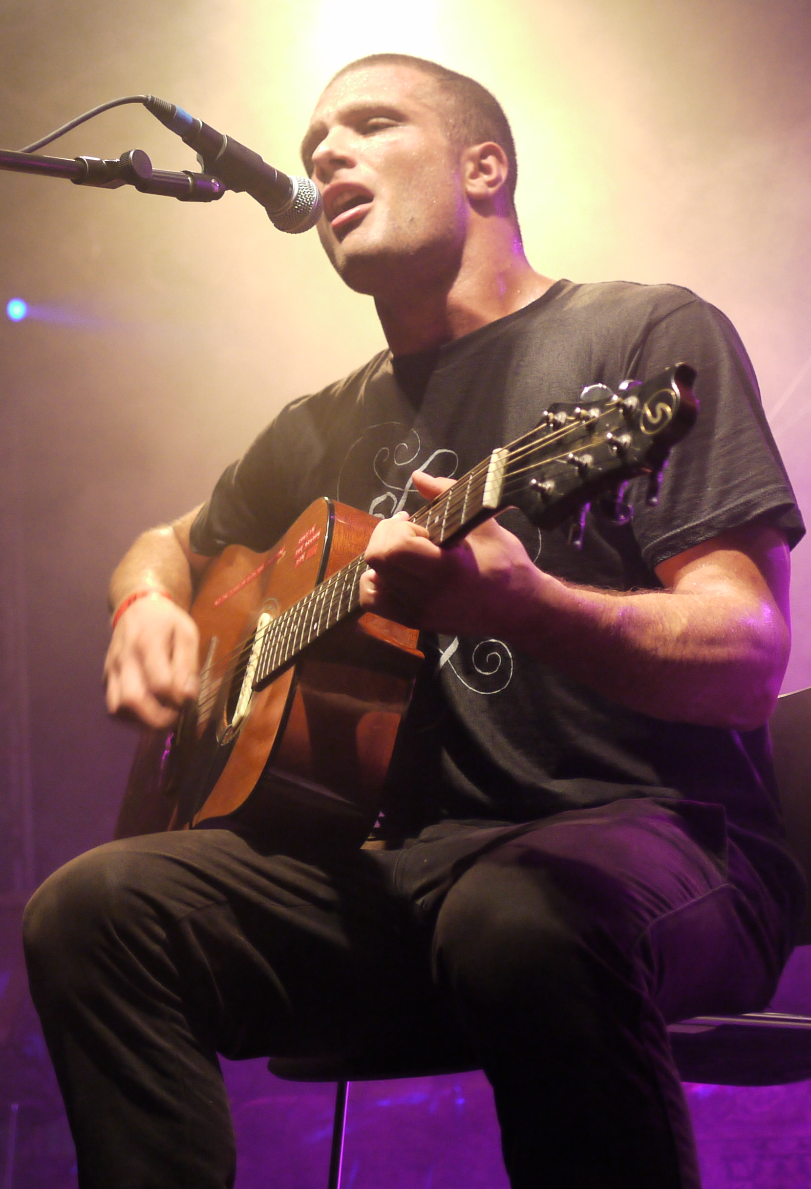 Cosmo Jarvis (GB) am 03.08.2013 auf der 25. Detmolder Sommerbühne